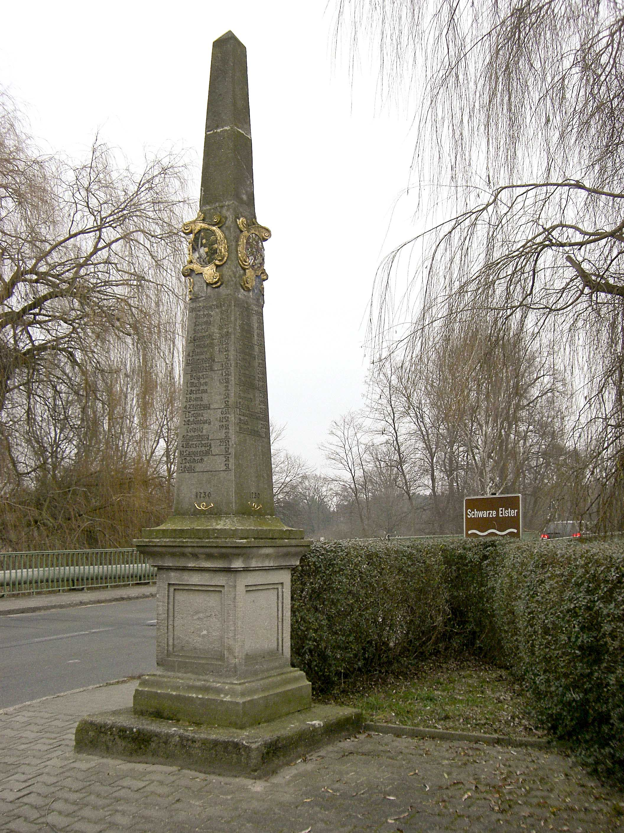 Kursächsischen Postmeilensäule-Distanzsäule, Brückenstraße in Uebigau-Wahrenbrück OT Wahrenbrück